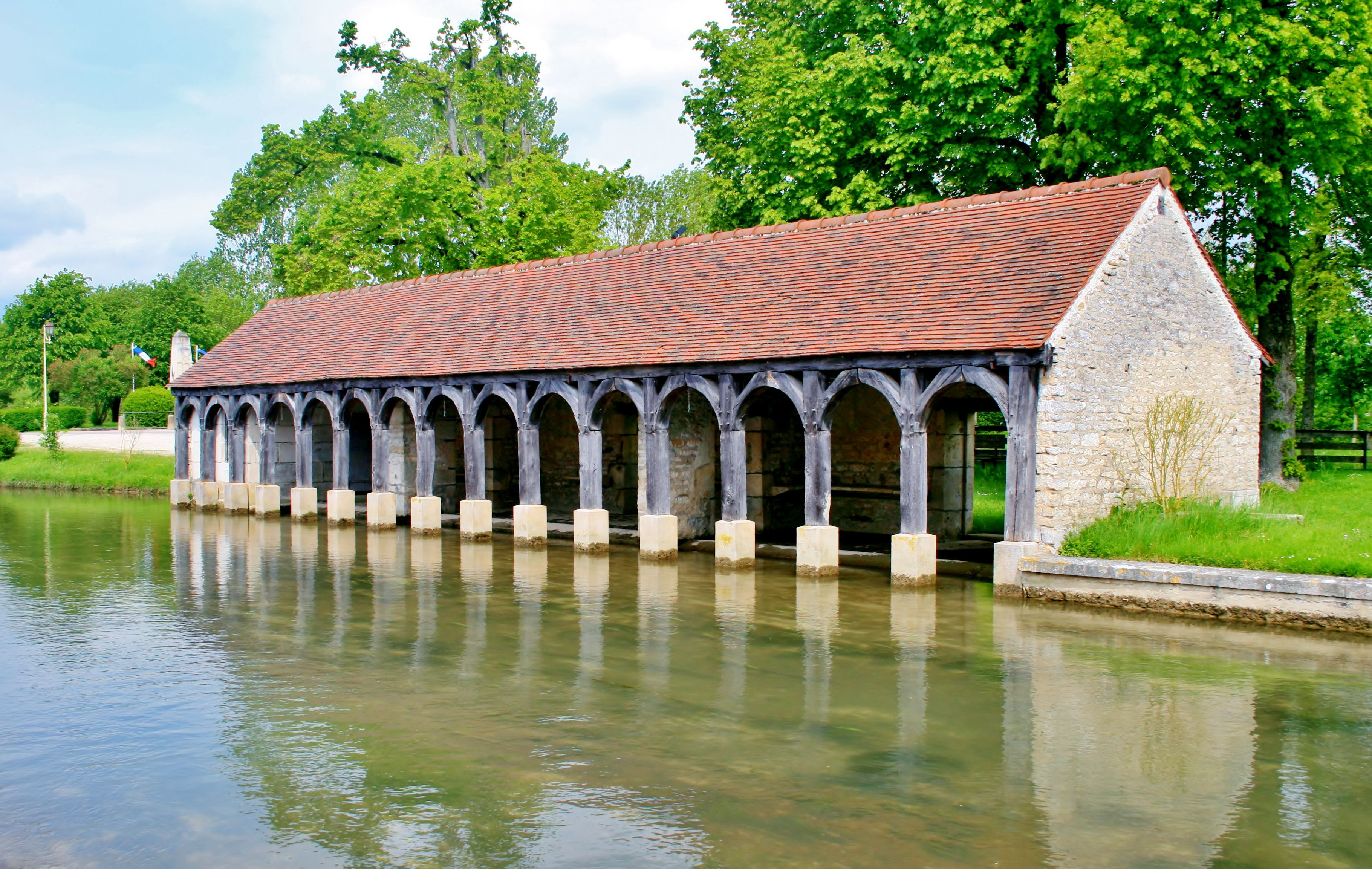 Lavoir sur la rivière Ource. Vanvey. Côte d'Or.